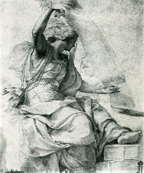 Сивілла: штудія до фрески